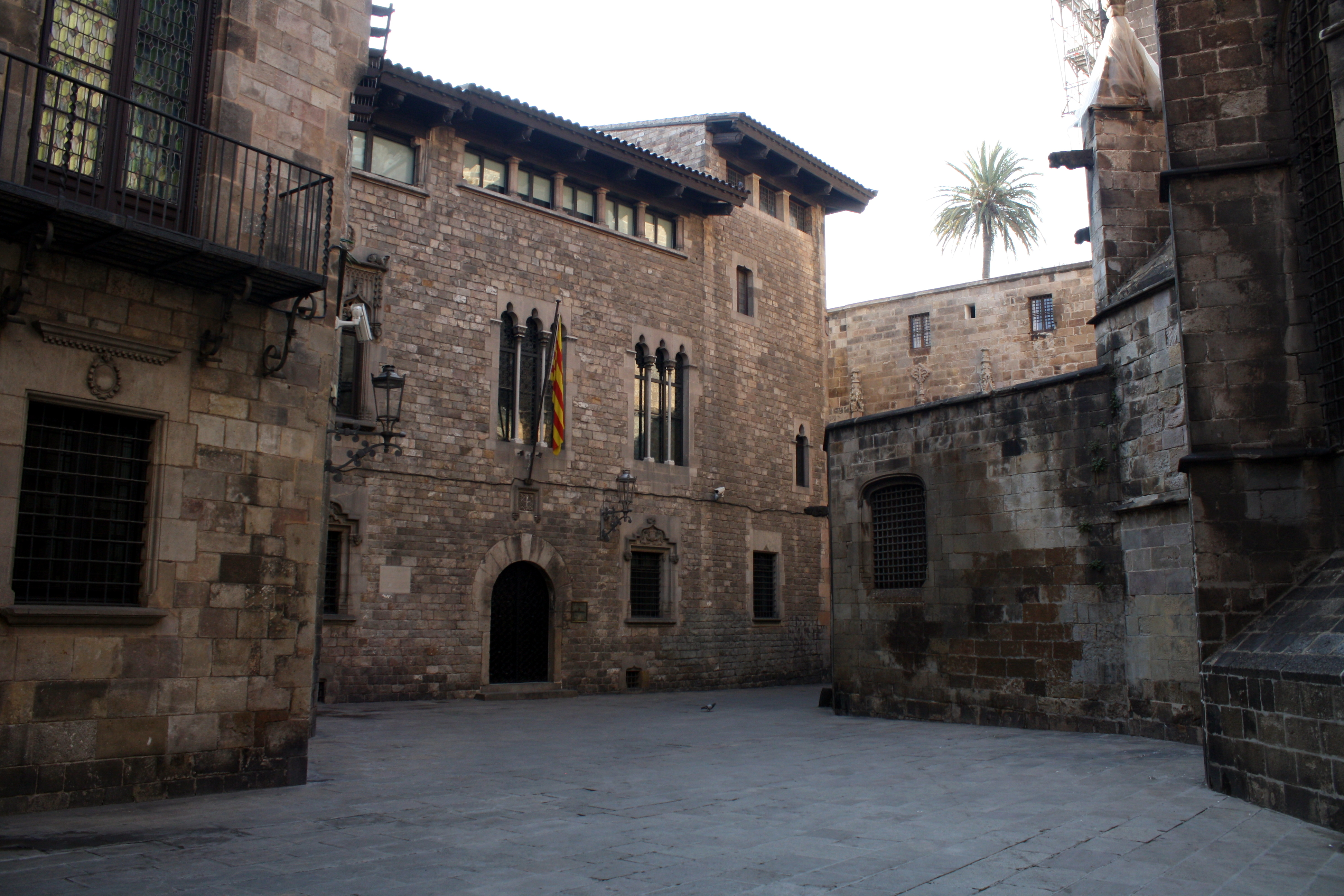 Entrada de la Casa dels Canonges, vista des del costat del presbiteri de la catedral